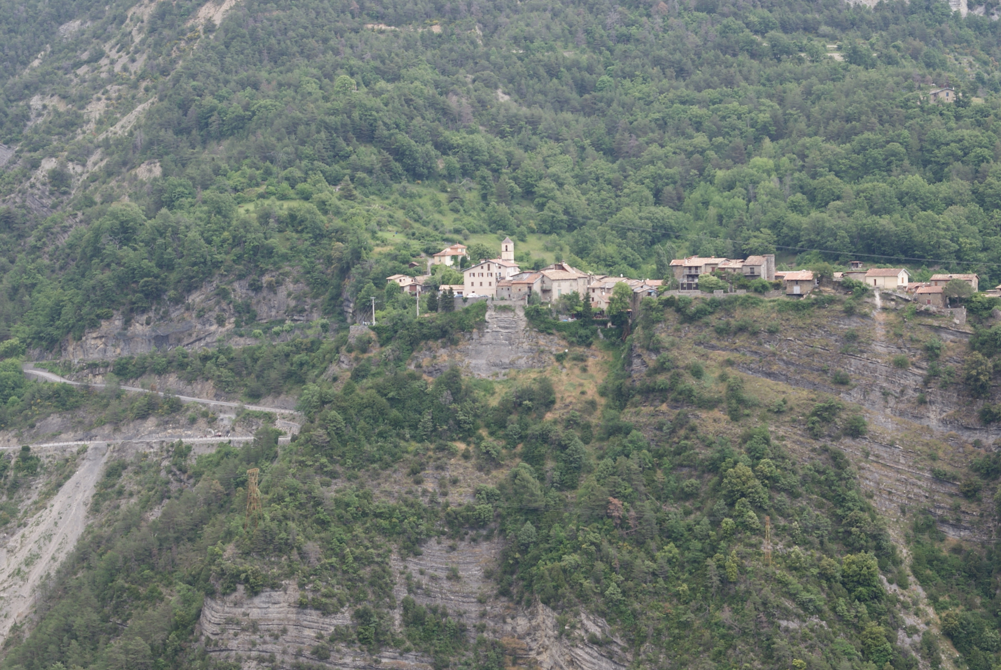 village de Marie, France